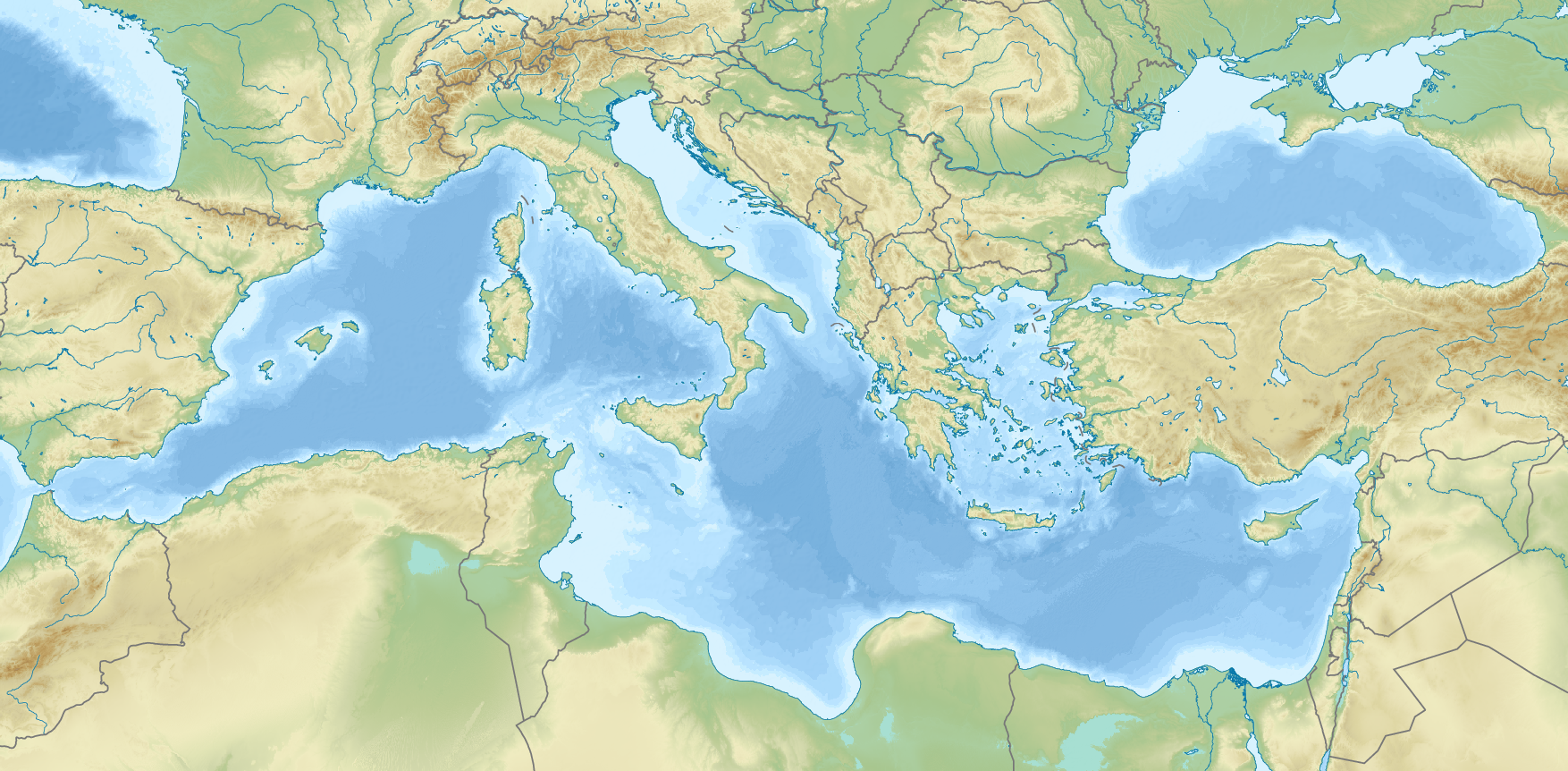 Физическая карта Средиземного моря.